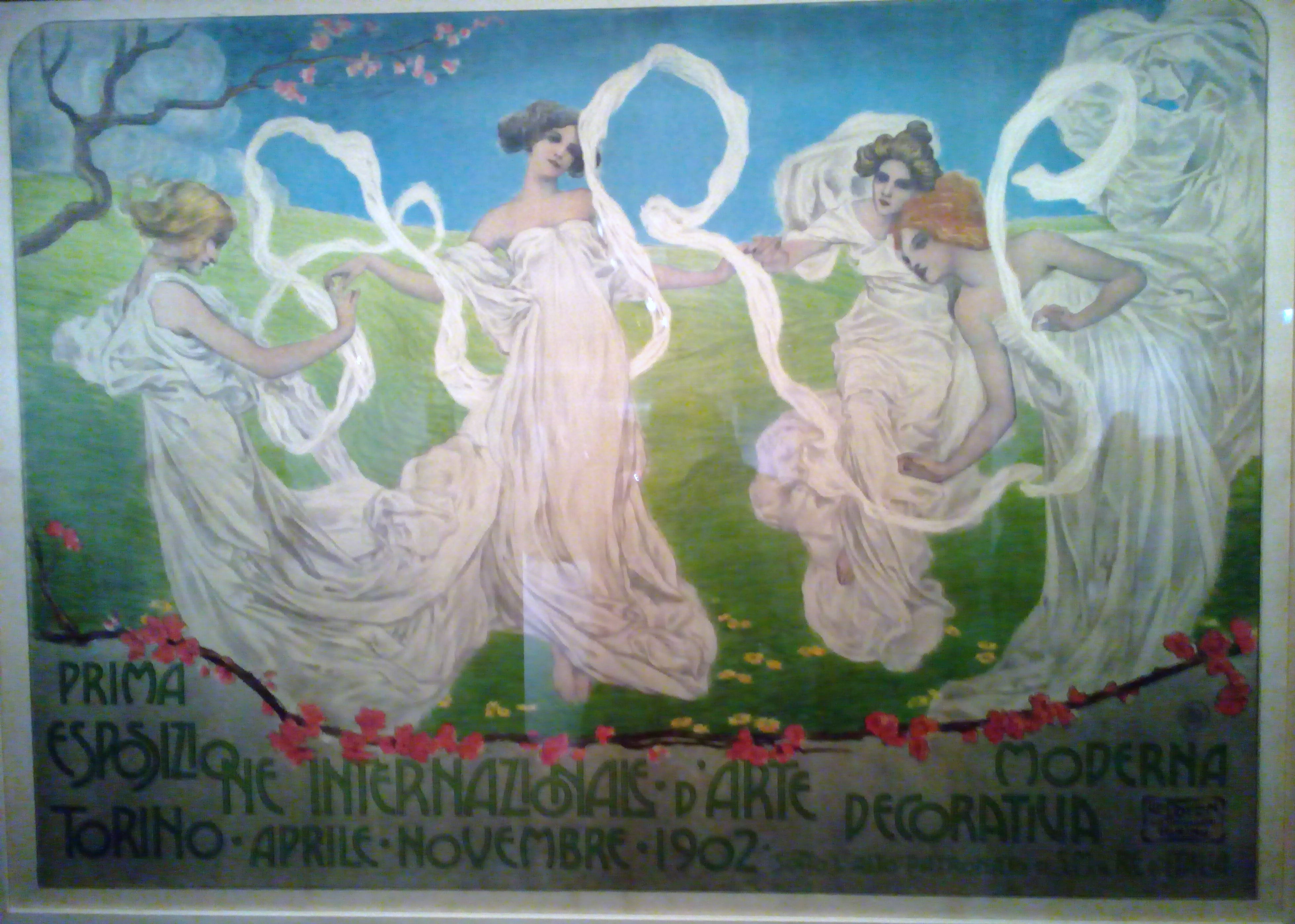 Manifesto originale Esposizione arte decorativa moderna di Torino del 1902, esposto al museo d'Orsay di Parigi